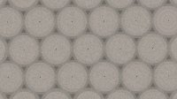 Het schematische bovenaanzicht bij horizontale grondinjectie